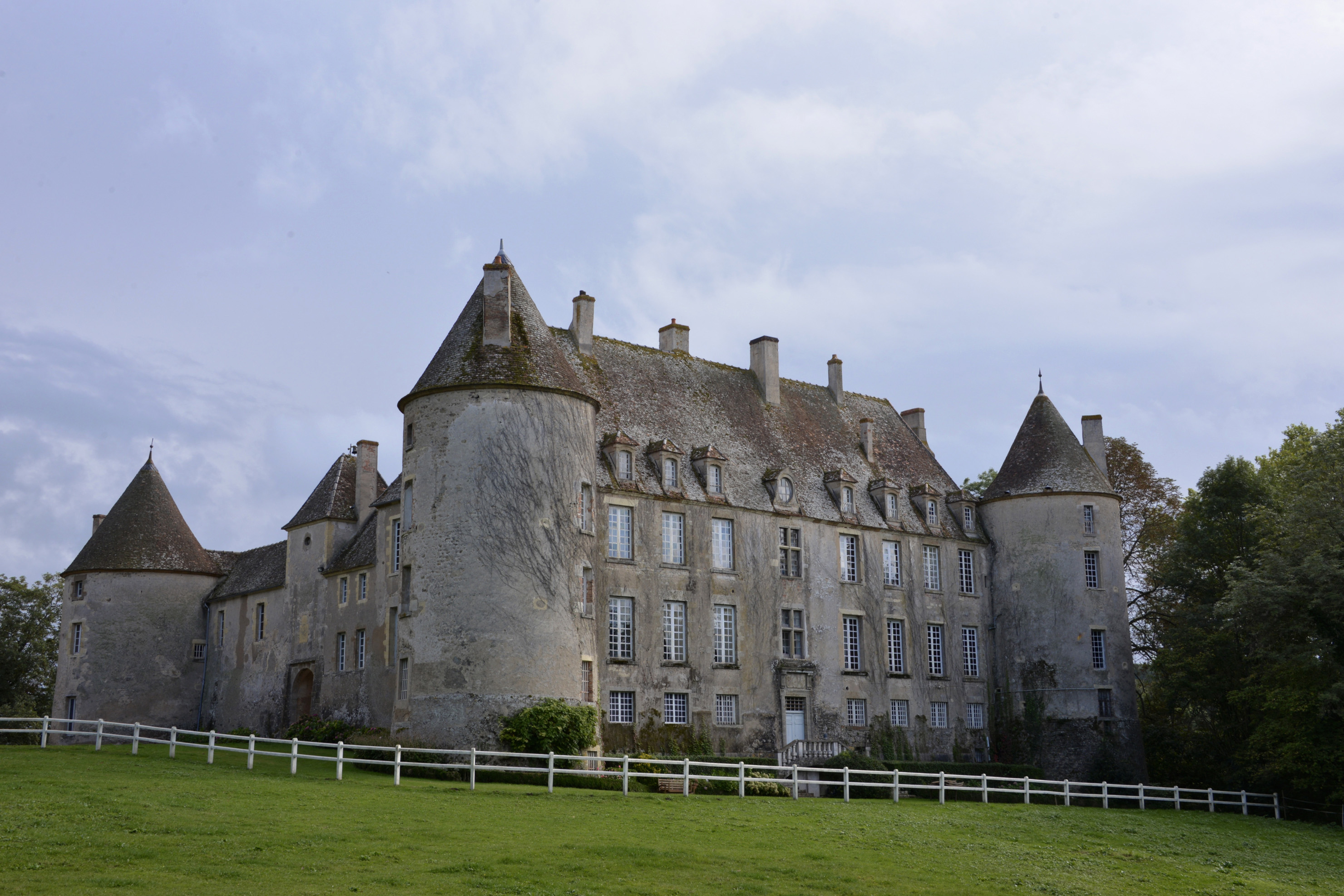 Château de Chitry-les-Mines .